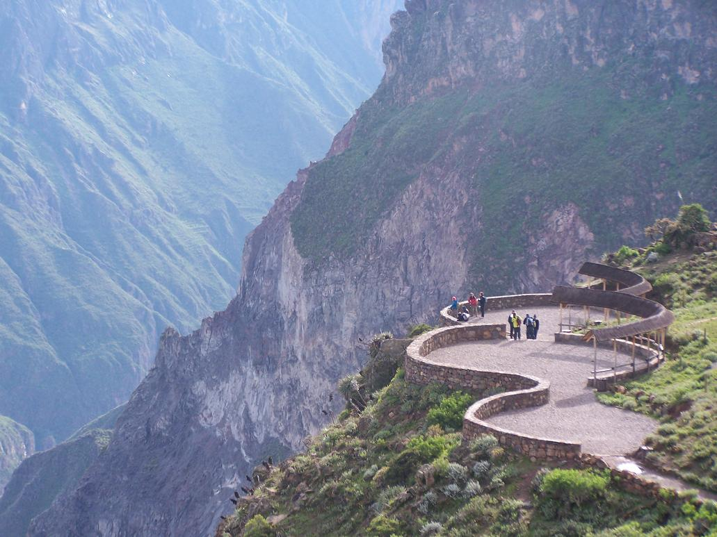 Vista del mirador "la cruz del condor" en el cañón del Colca